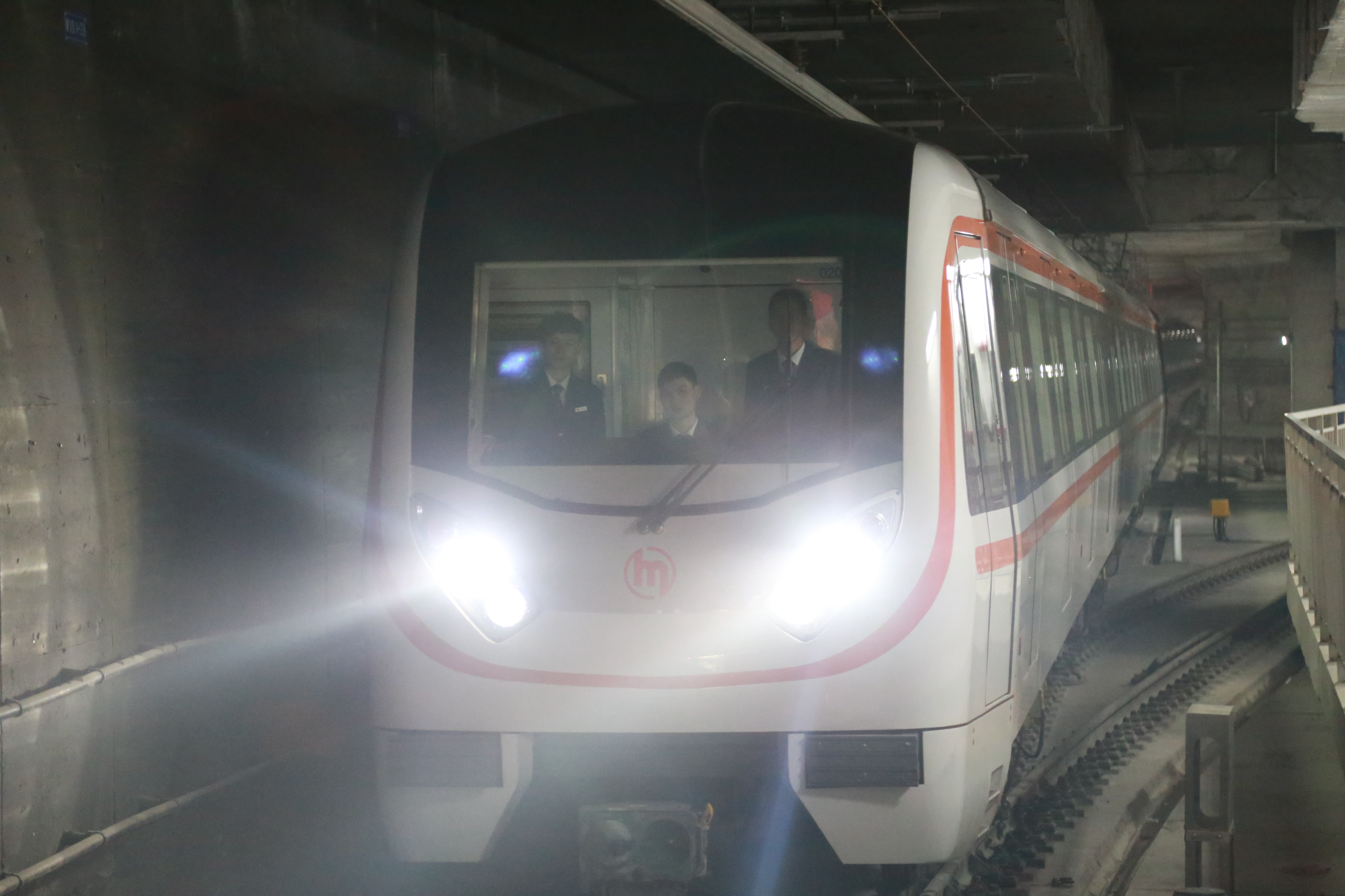 2号线列车进入钱江路站